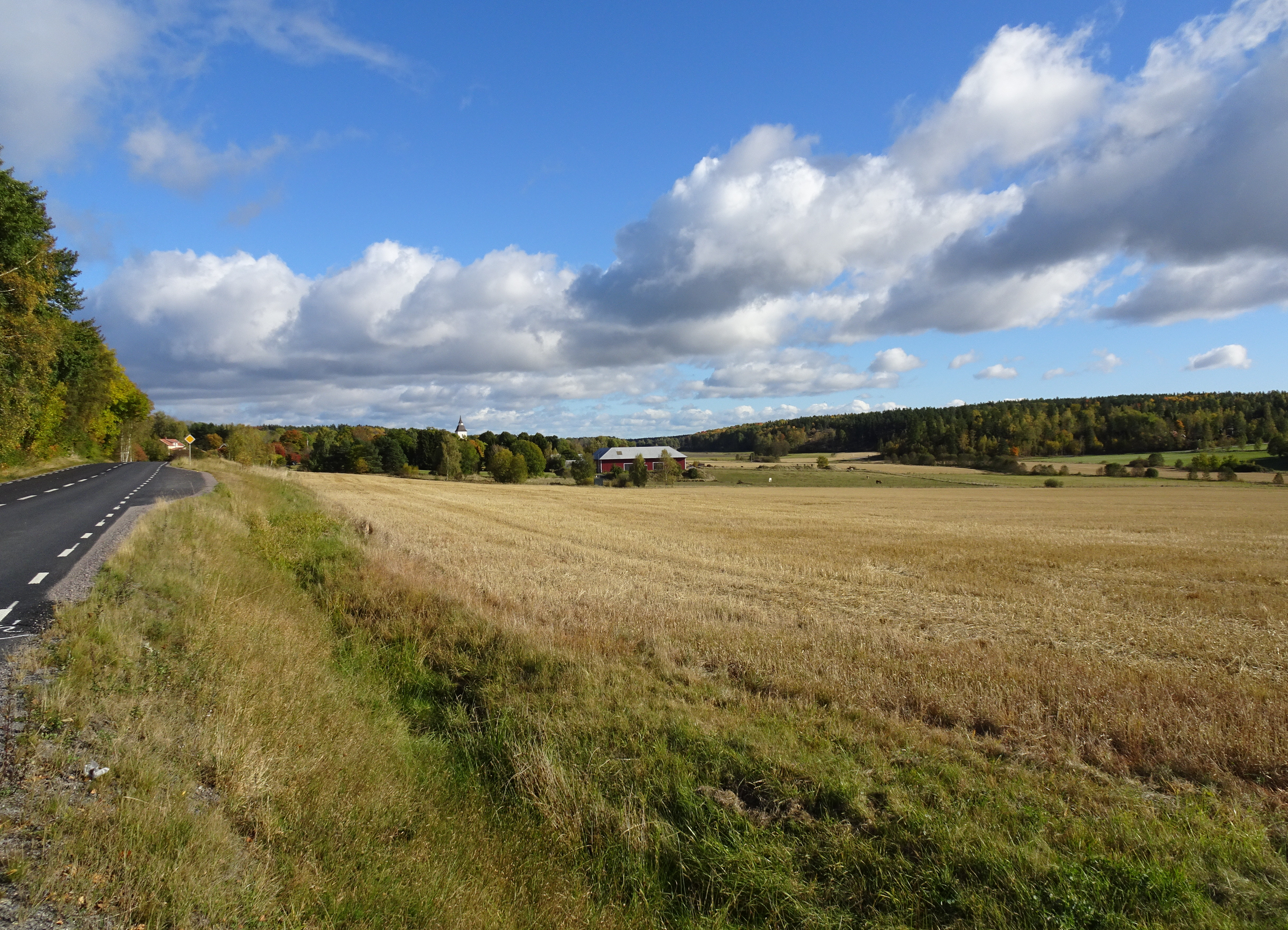 Enhörnas kulturlandskap